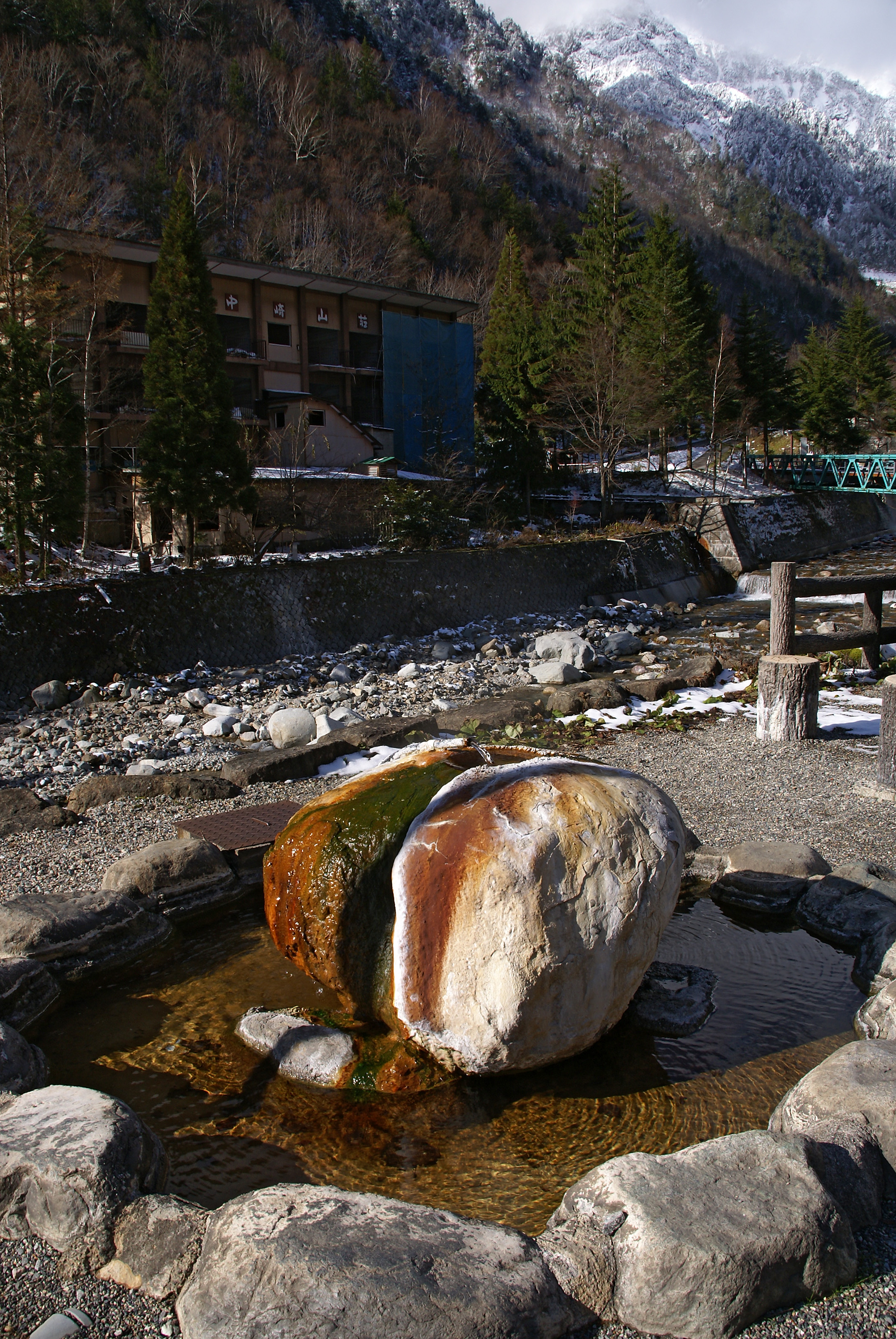 Shinhodaka Onsen in Takayama, Gifu prefecture, Japan